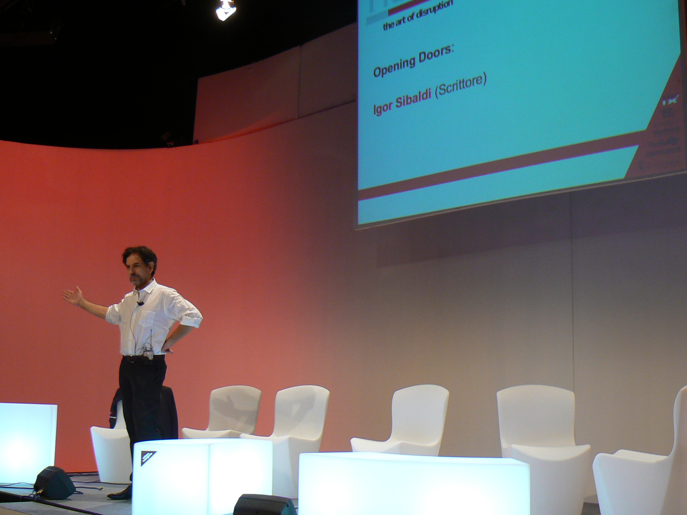 Igor Sibaldi che tiene una conferenza a Torino nel 2009